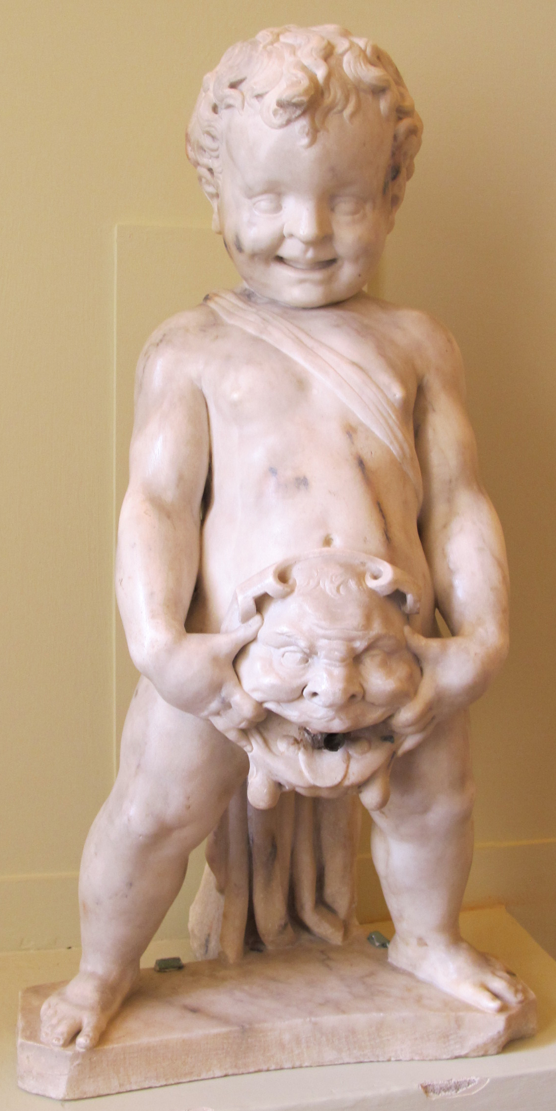 Museo Nazionale d'Arte Medievale e Moderna - MIBAC This is a photo of a monument which is part of cultural heritage of Italy.